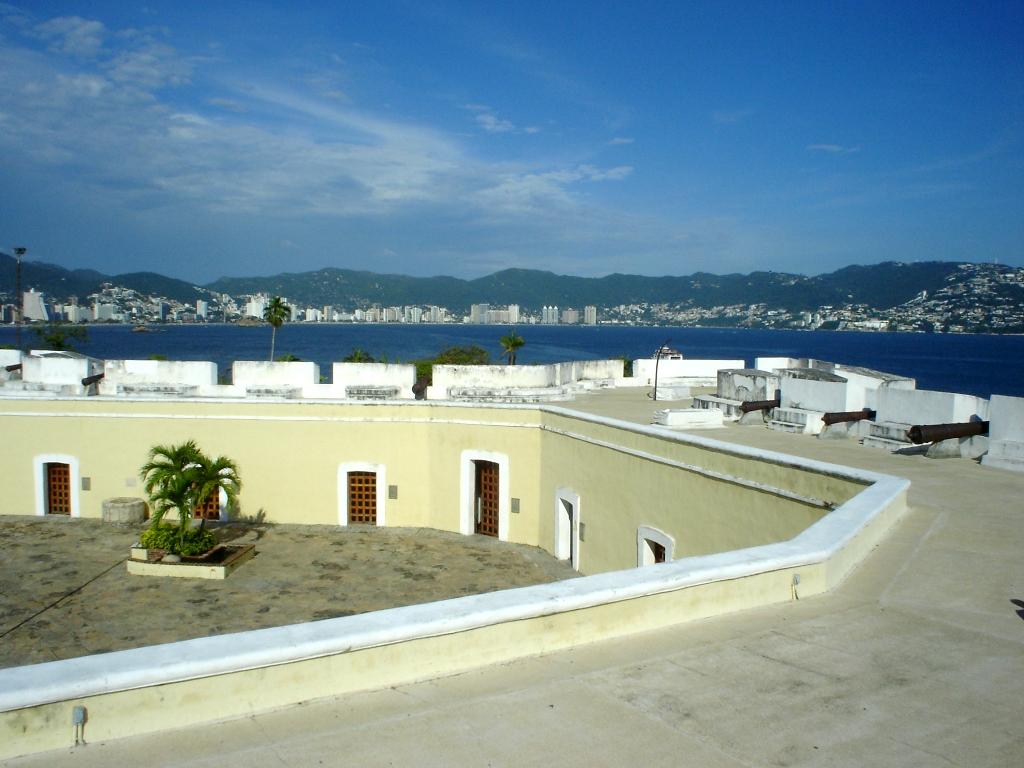 Panorama del Fuerte de San Diego en Acapulco, Guerrero, México.